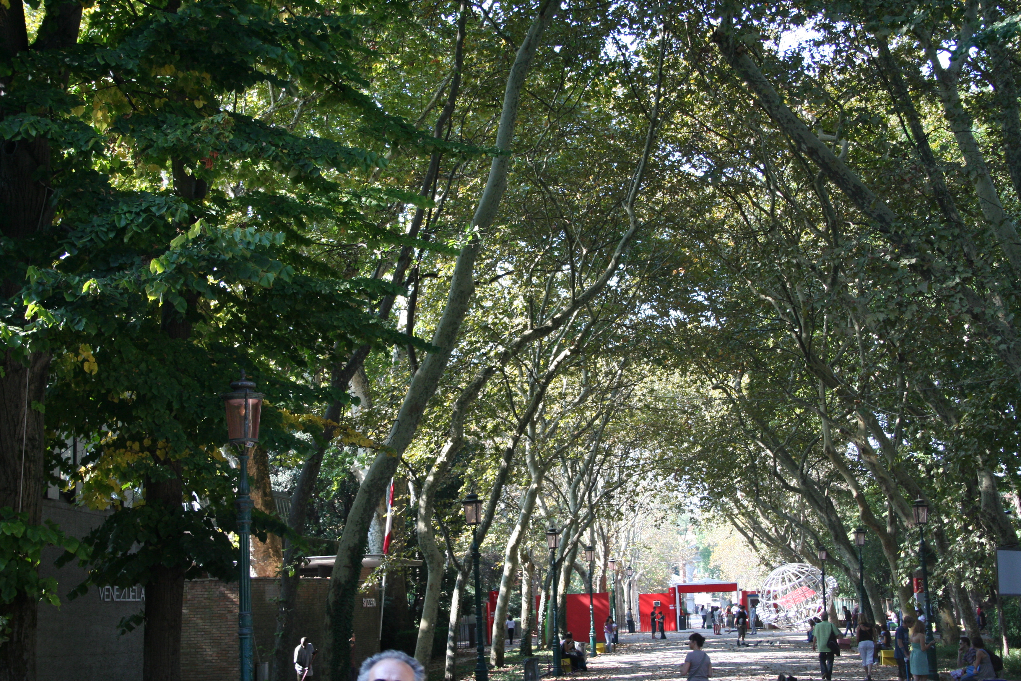 Градините на венецианското биенале, 2009